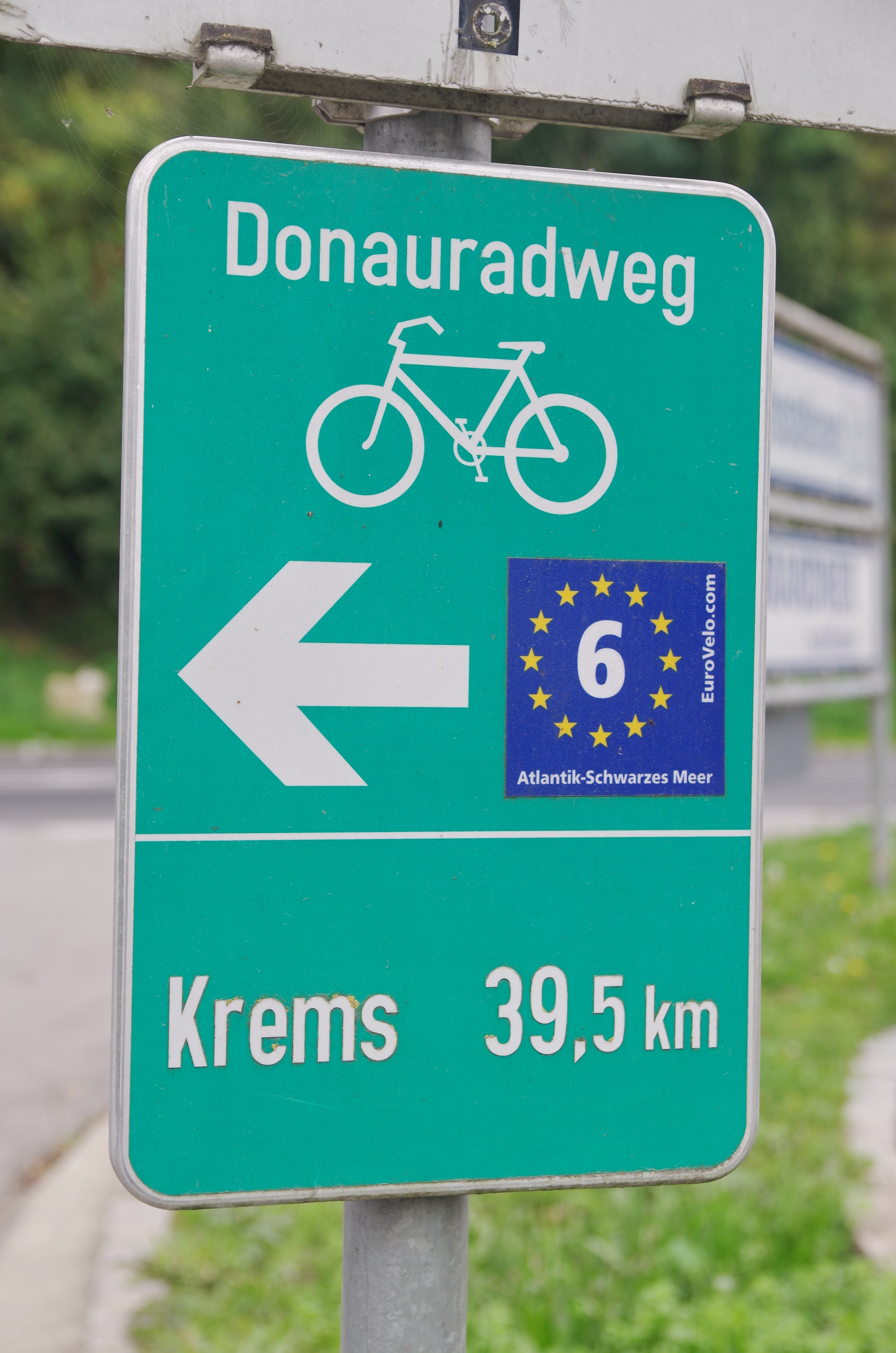 Beschilderung Donauradweg Ortsausgang Melk stromabwärts